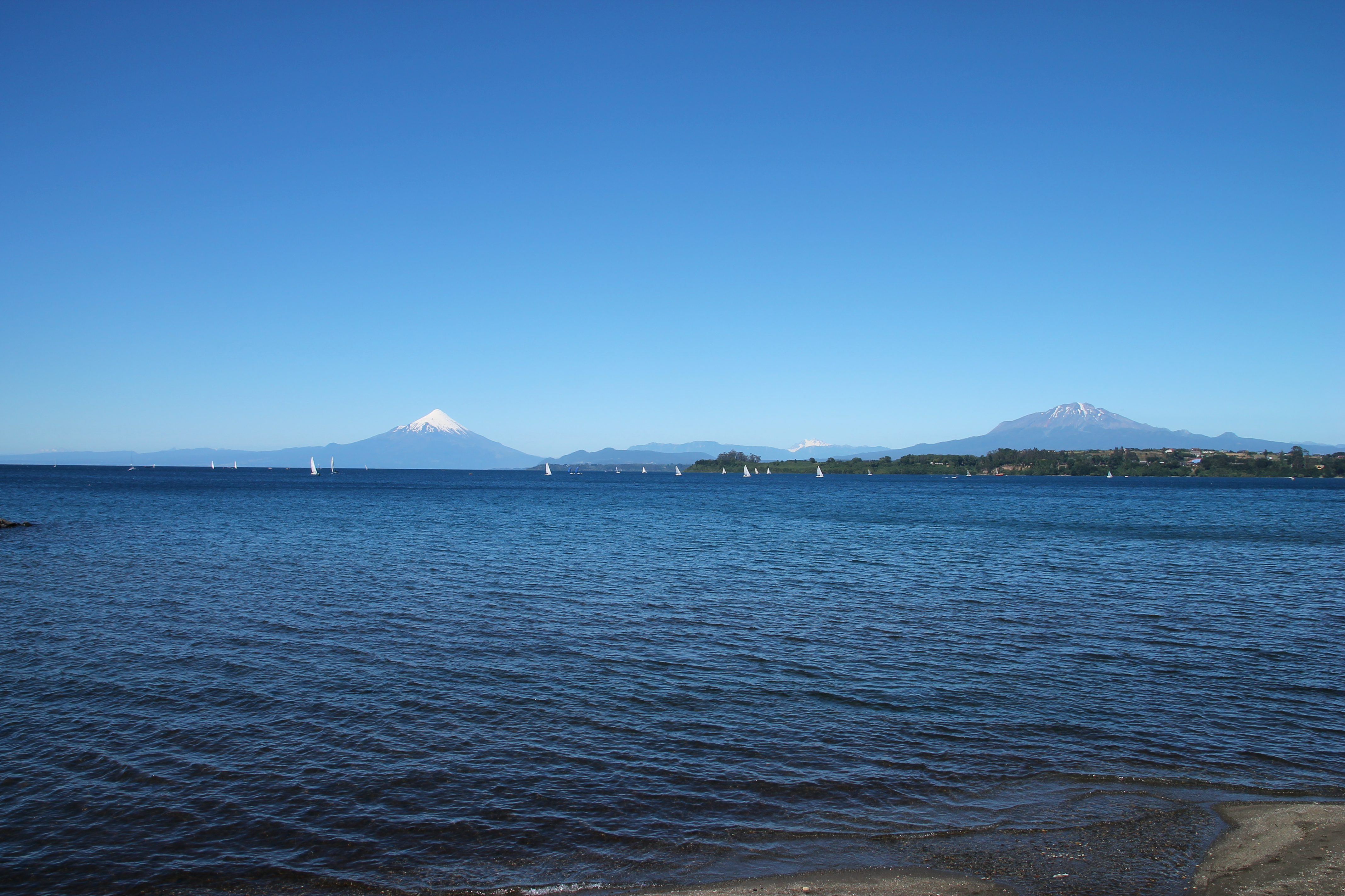 Vista a volcanes Osorno y Calbuco desde Puerto Varas